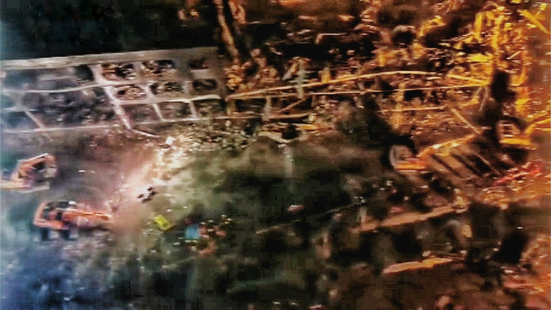 溫嶺貨車爆炸震塌大樓